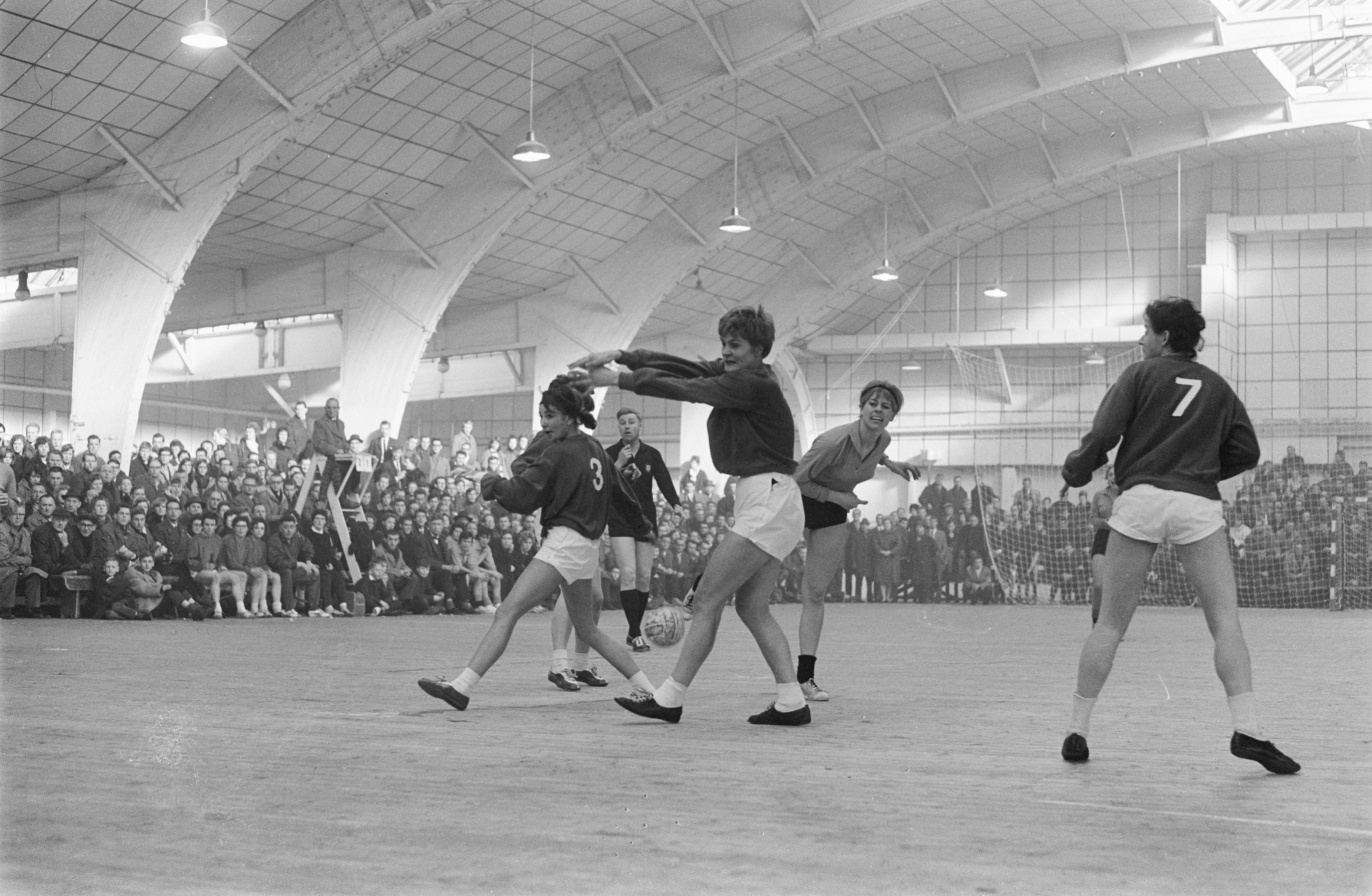 Collectie / Archief : Fotocollectie Anefo Reportage / Serie : [ onbekend ] Beschrijving : Nationale zaalhandbalkampioenschappen in Oude RAI . Niloe tegen Swift dames. Spelmoment Datum : 24 februari 1963 Trefwoorden : sport, zaalhandbal Instellingsnaam : Swift Fotograaf : Gelderen, Hugo van / Anefo Auteursrechthebbende : Nationaal Archief Materiaalsoort : Negatief (zwart/wit) Nummer archiefinventaris : bekijk toegang 2.24.01.05 Bestanddeelnummer : 914-8615